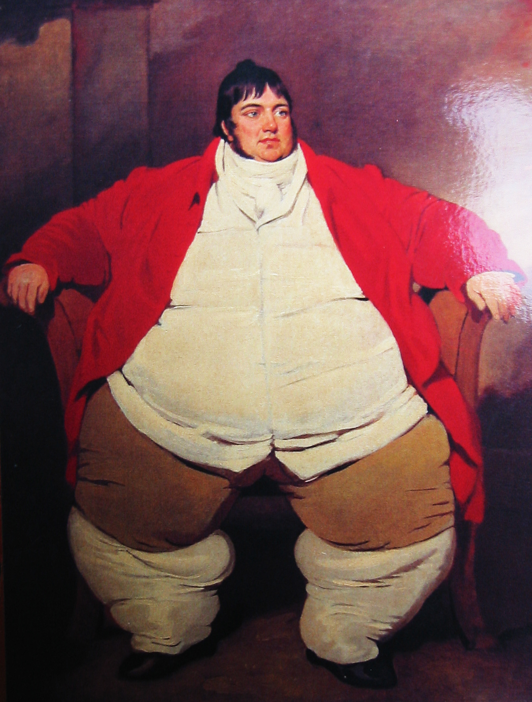 Portrait of Daniel Lambert